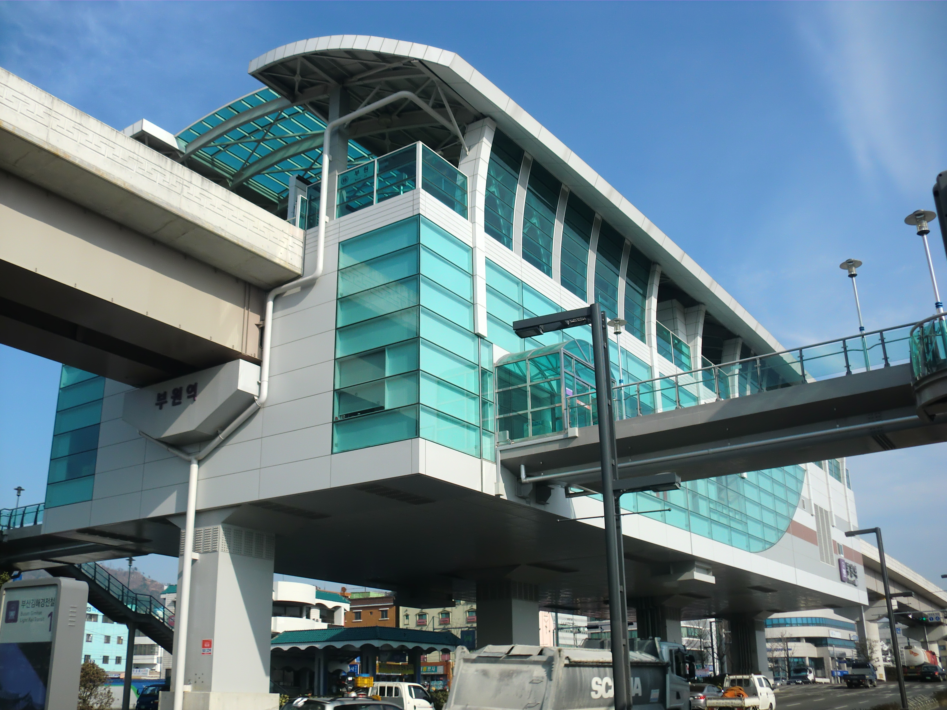 부산김해경전철 부원역